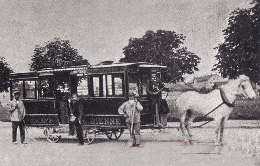 Bieler Pferdestrassenbahn Wagen Nr. 5 im Ausland gebaut.